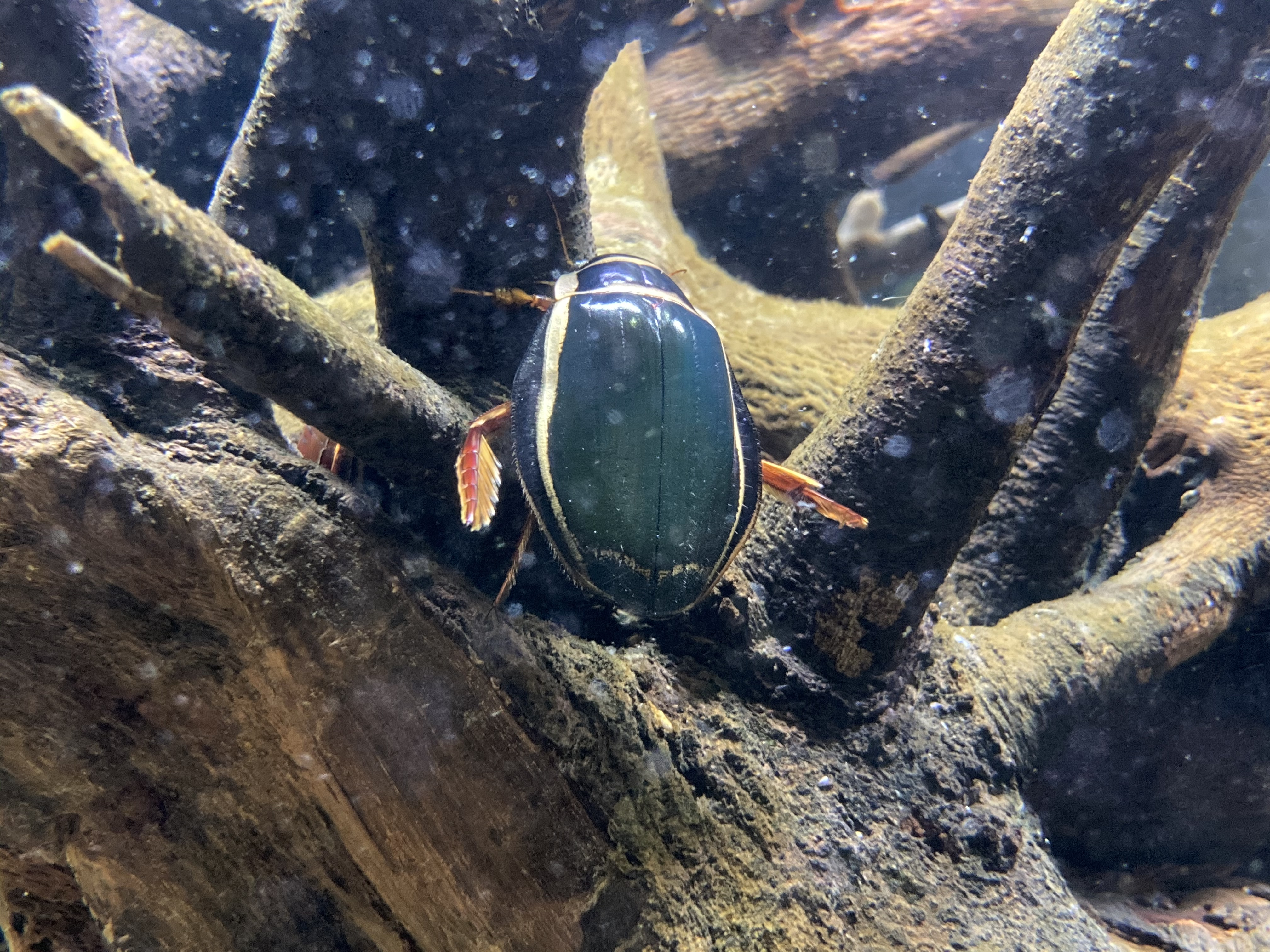 オウサマゲンゴロウモドキ♂